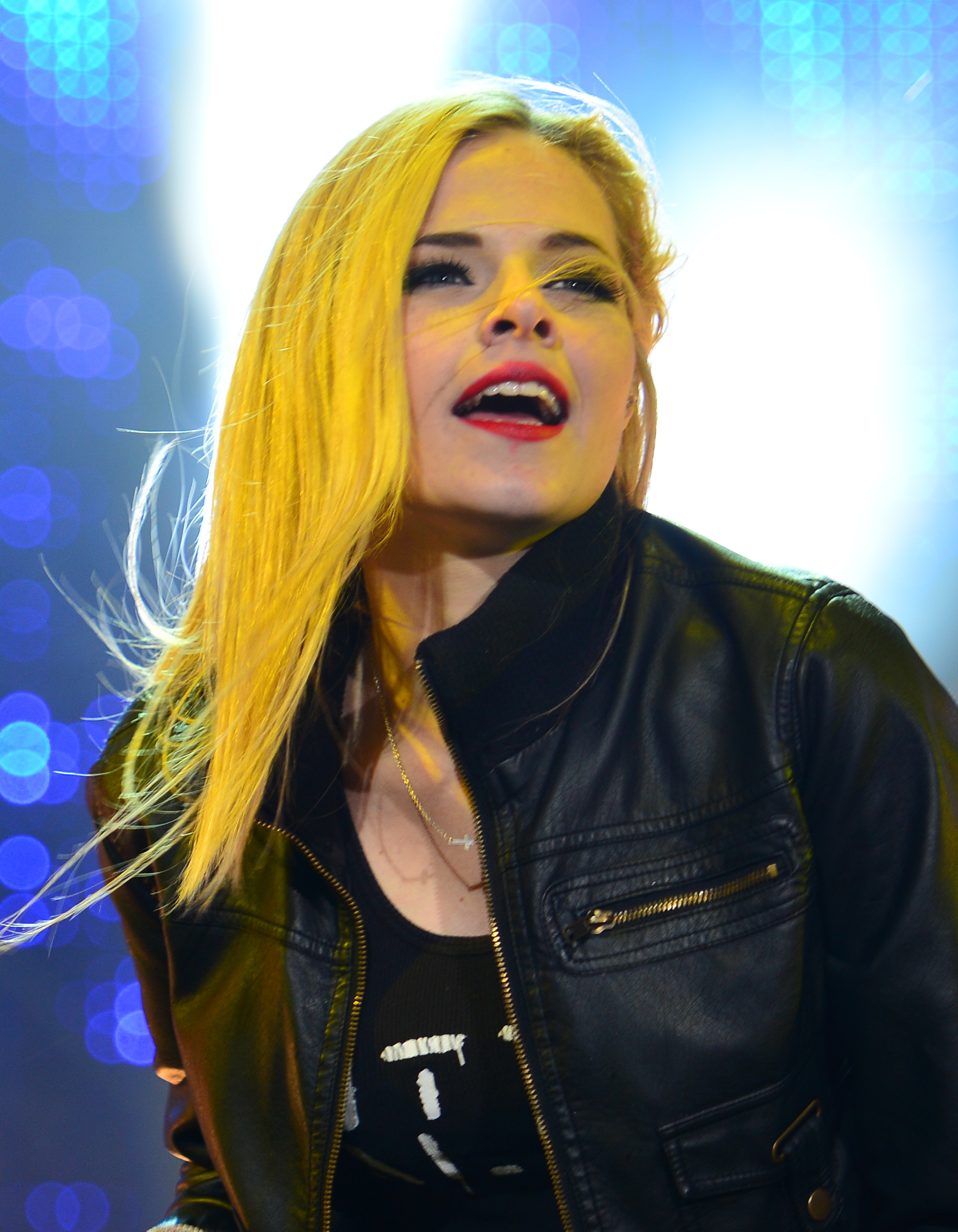 Savatage beim Wacken Open Air 2015